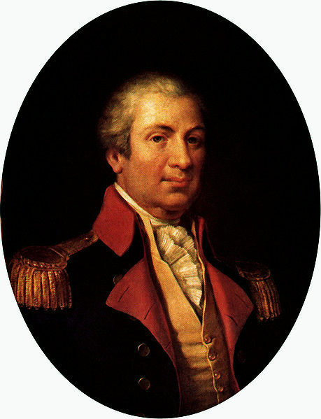 портрет генерала Генри Нокса